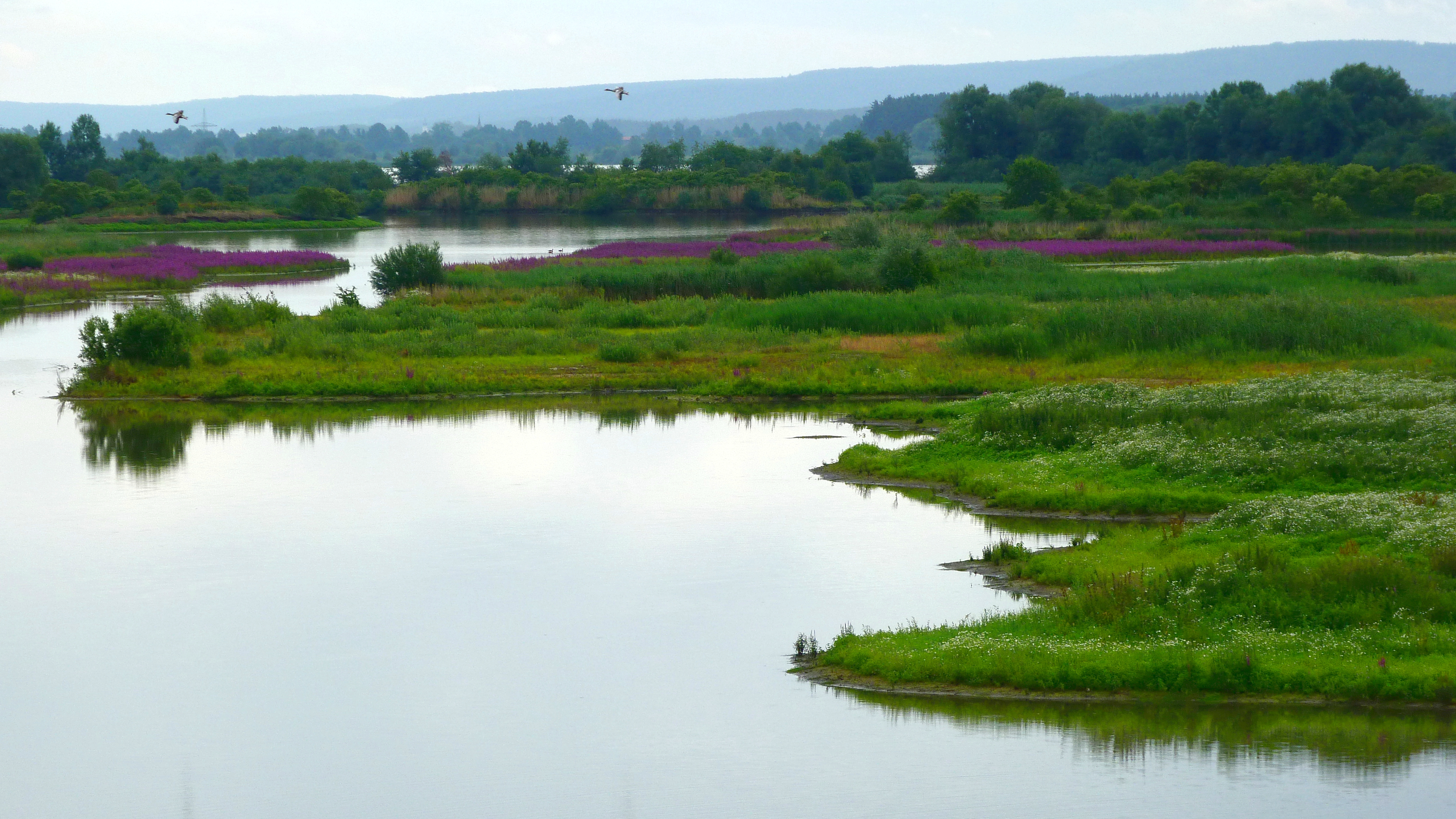 Am Altmühlsee, NSG Vogelfreistätte Flachwasser- und Inselzone im Altmühlsee